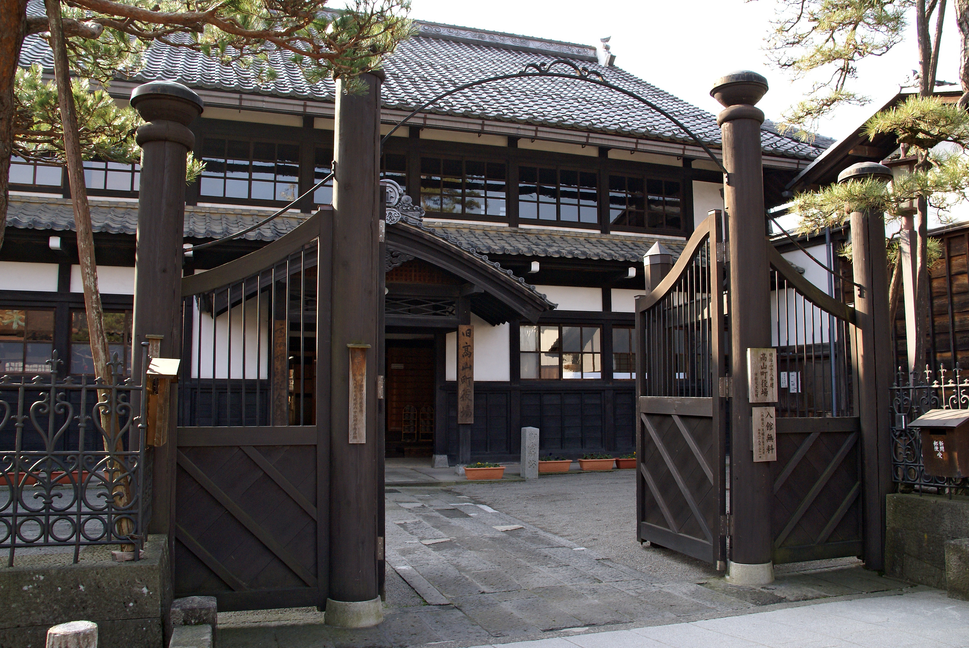 Takayama City Memorial Hall in Takayama, Gifu prefecture, Japan